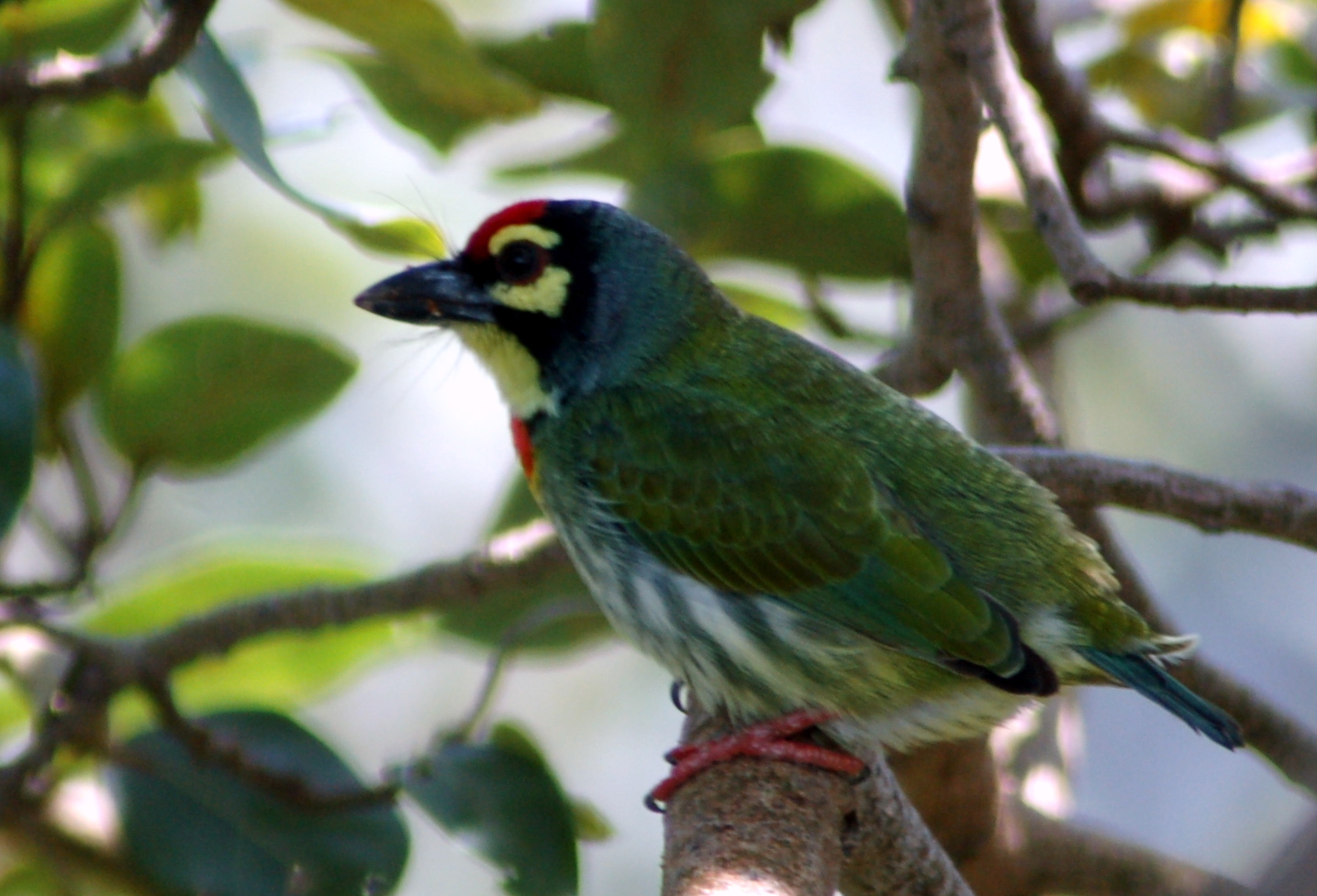 Coppersmith Barbet : Megalaima haemacephala